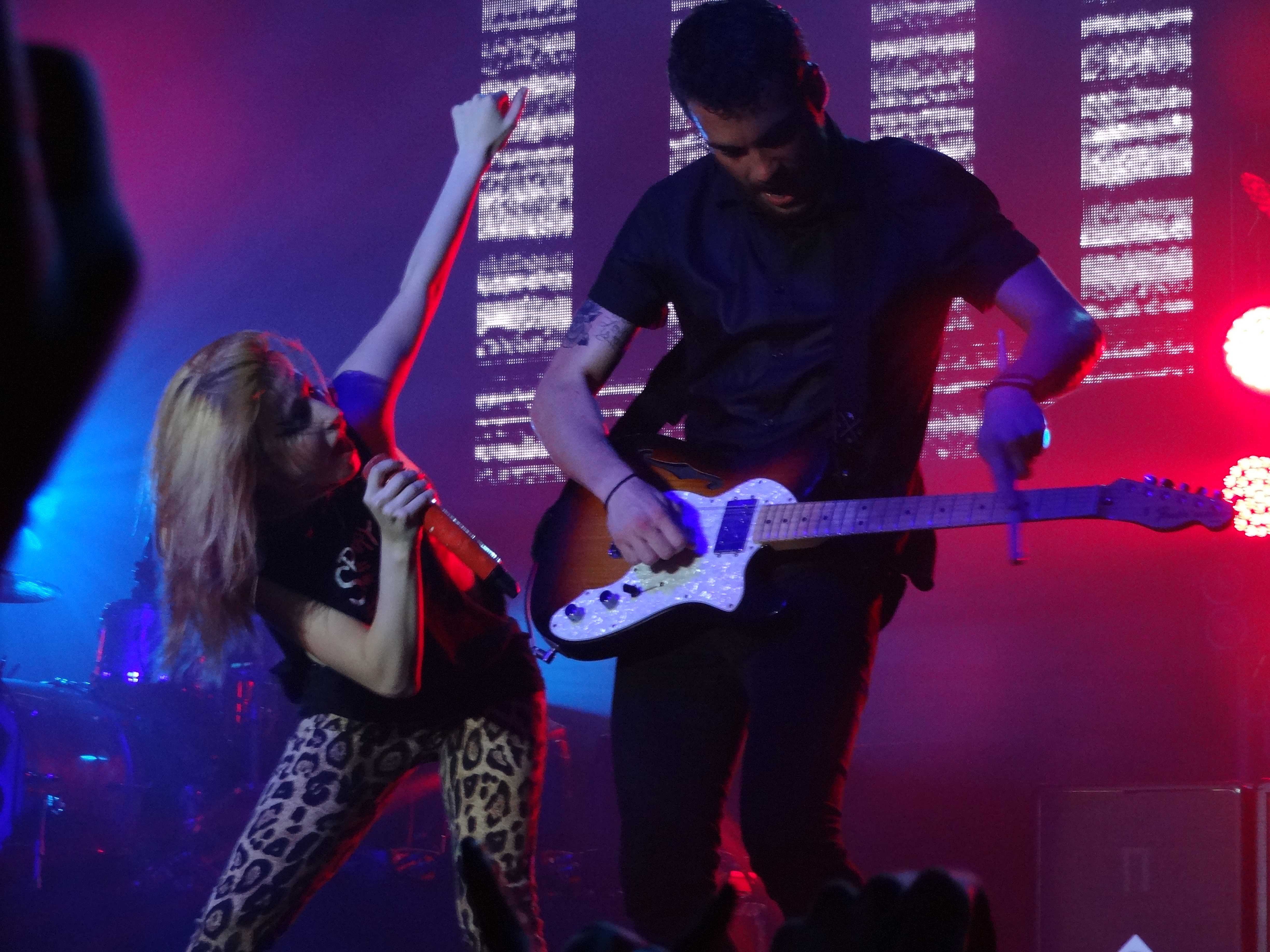 Paramore en vivo en São Paulo el 30 de julio de 2013. En la imagen: Hayley Williams y Taylor York.